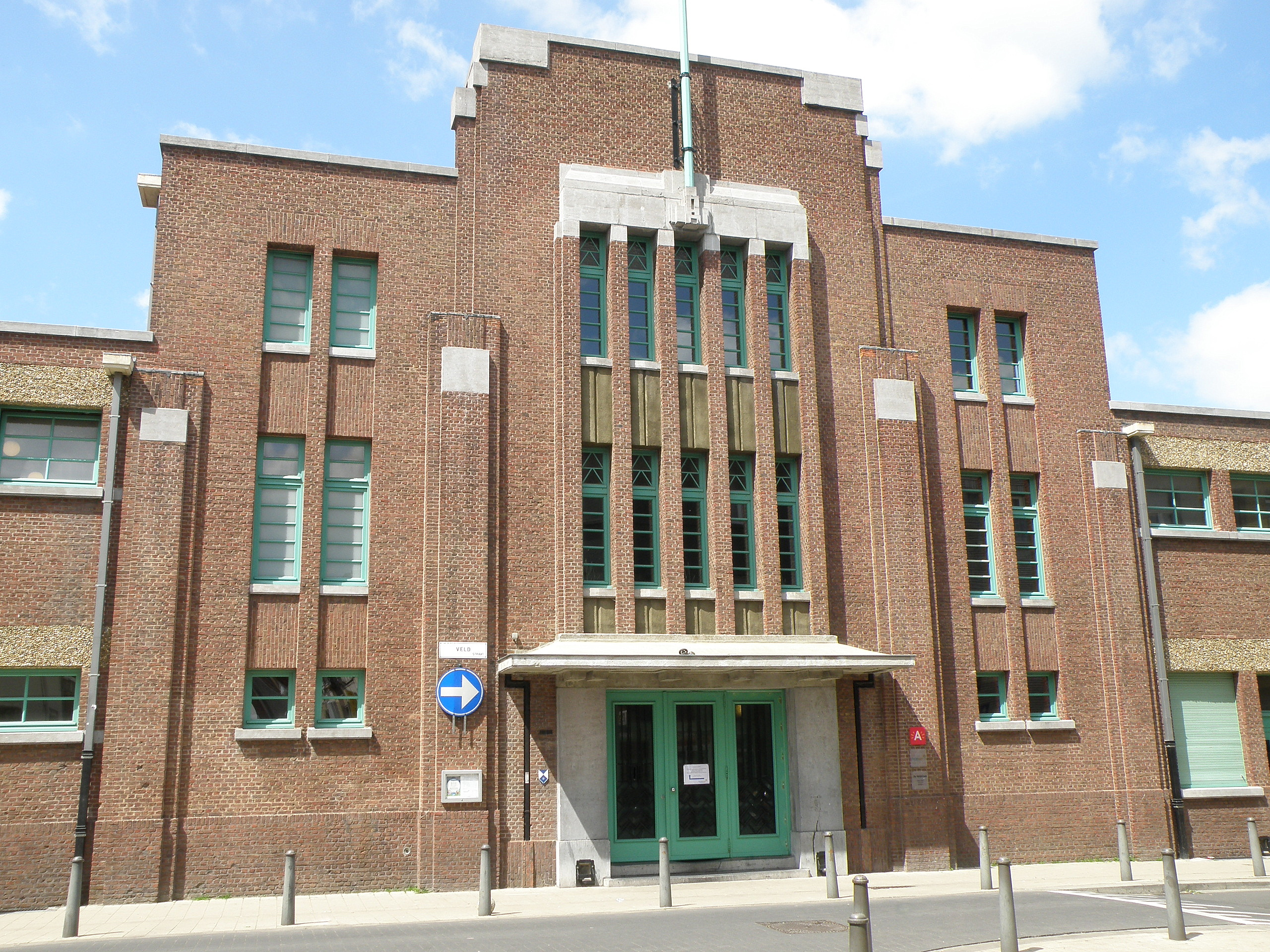 Anvers, Belgique. Piscine municipale de style art déco sise Veldstraat et Alfons Engelsstraat, dans le quartier du Stuivenberg. Plans de Joseph Algoet, Émile van Averbeke et Jan van Asperen, 1926. Façade et entrée principale sur la Veldstraat.